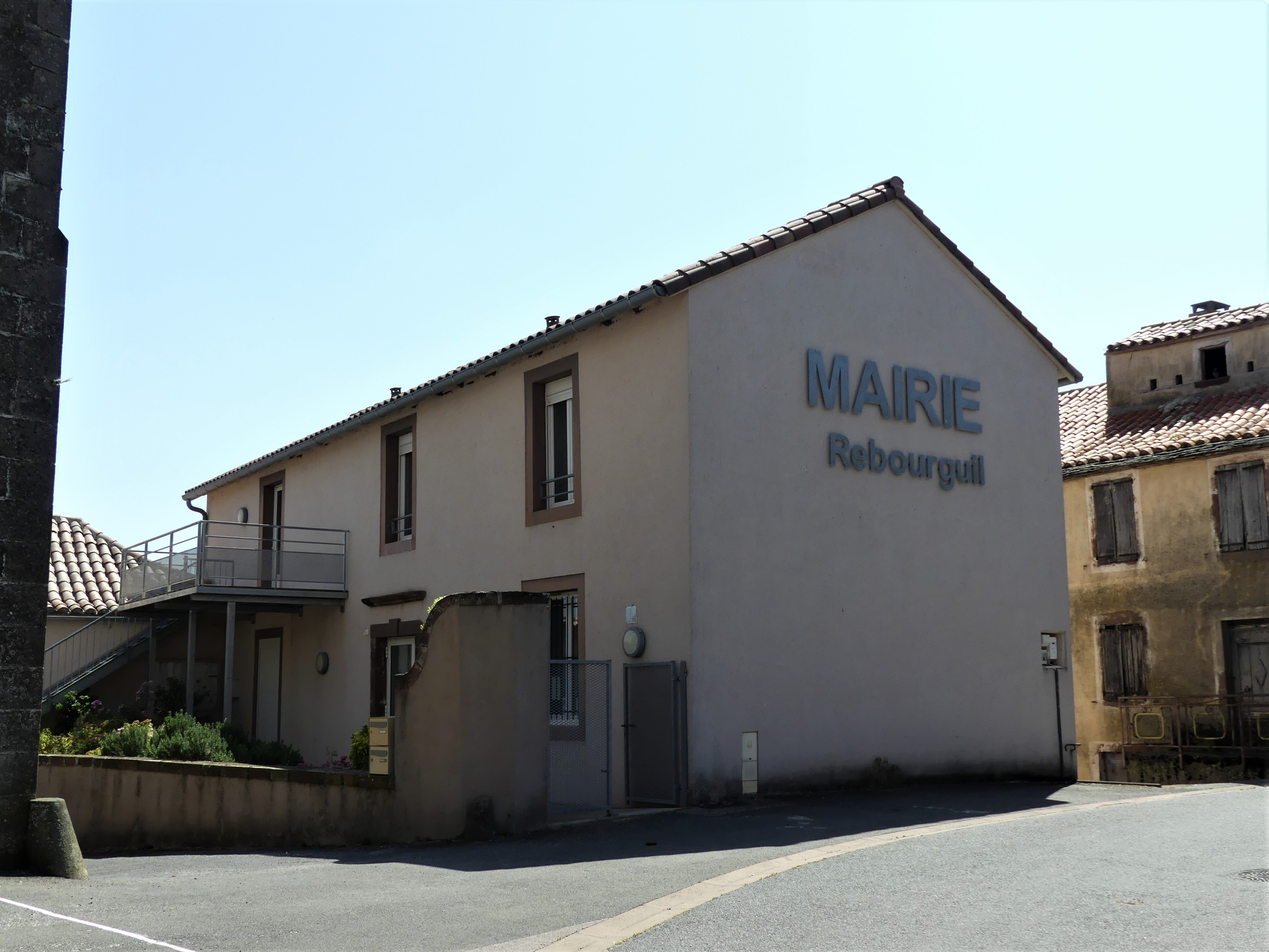 La mairie de Rebourguil, Aveyron, France.